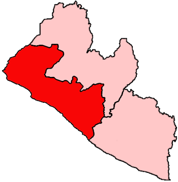 Mappa dell'arcidiocesi cattolica di Monrovia, in Liberia.